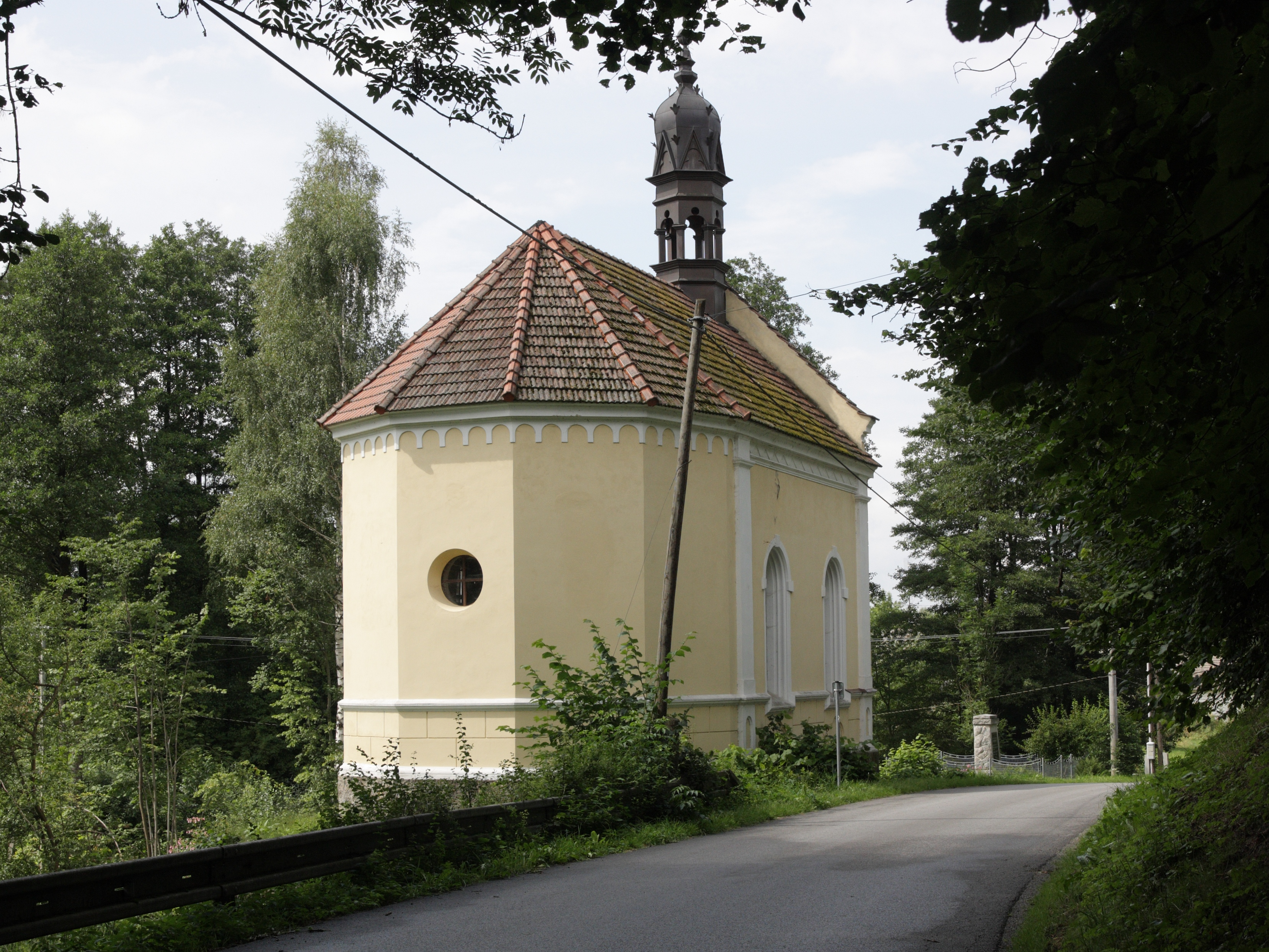 Dlouhá Stropnice - kaple z roku 1901.